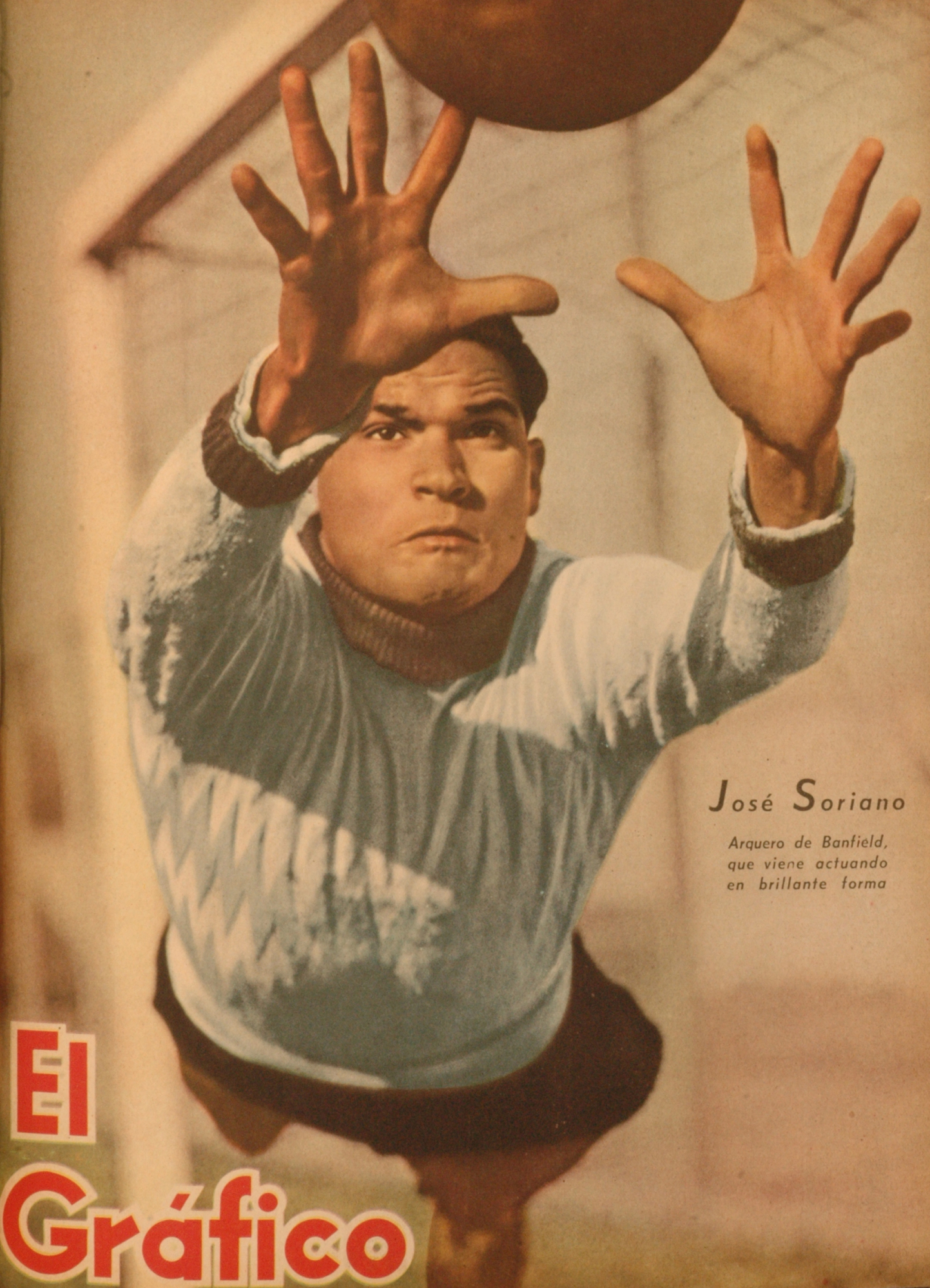 El Grafico del 07 de Agosto de 1942. Edicion 1204